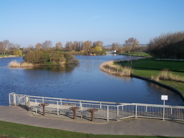 Brooklands Boating Lake